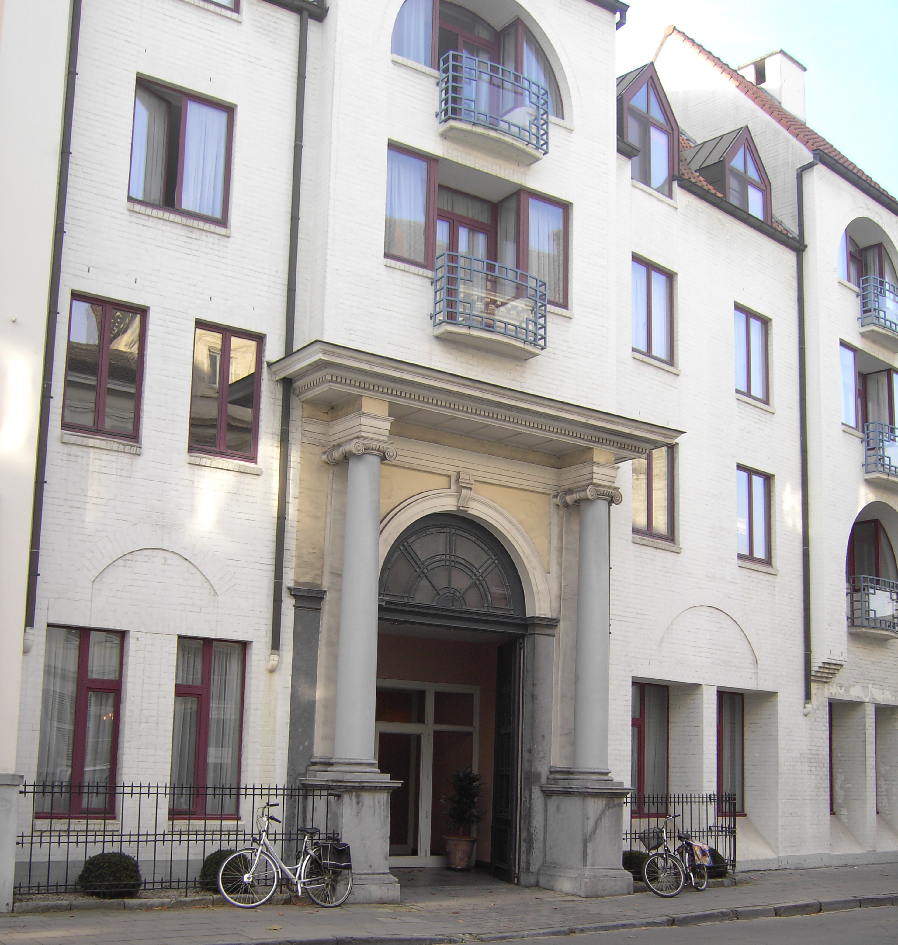 Zestiende-eeuwse poort van het refugiehuis van de Sint-Niklaasabdij uit Veurne. In de negentiende eeuw deel van de bank Dujardin (failliet 1874), daarna klooster en onderwijsinstelling. Begin jaren 1990 zijn de negentiende- en twintigste-eeuwse uitbreidingen gesloopt. Thans de poort van een nieuw gebouwde seniorie - Garenmarkt - Brugge - West-Vlaanderen - Belgium